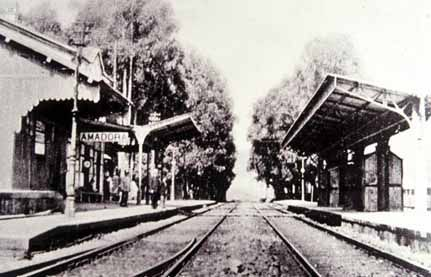 Estação da Amadora, Portugal (ainda com os telheiros antigos).